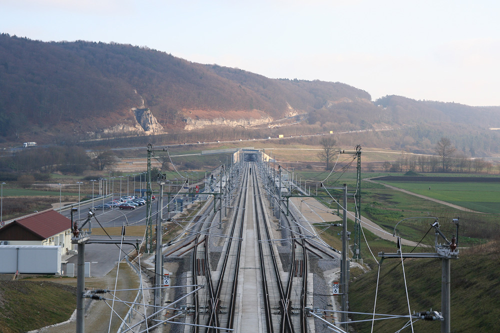 Überblick über den Bahnhof Kinding